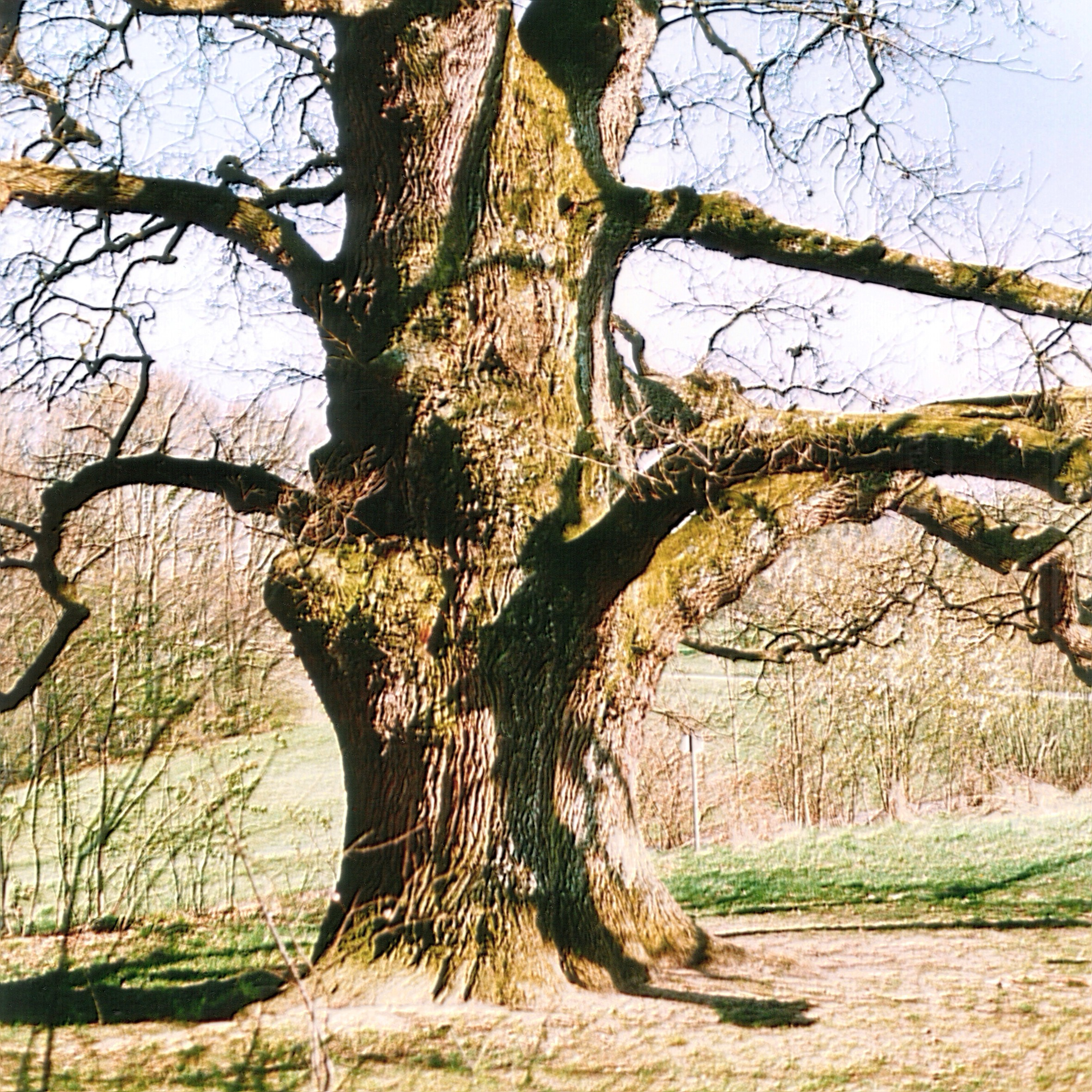 Sulzeiche, eine als Naturdenkmal geschützte Stieleiche (Quercus robur) in Walddorfhäslach, Baden-Württemberg